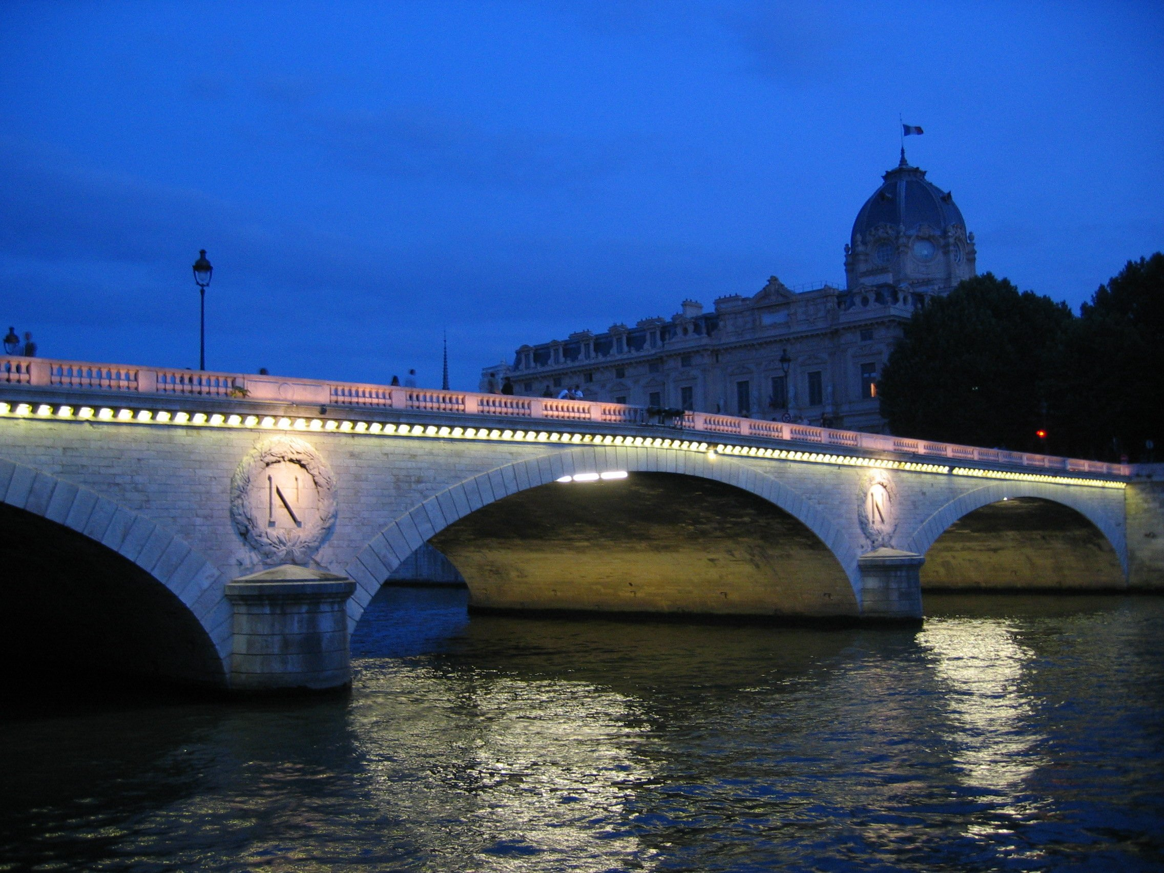 Photo du Pont au Change de nuit, vu d'aval. Prise en août 2005 par Utilisateur:Jgremillot